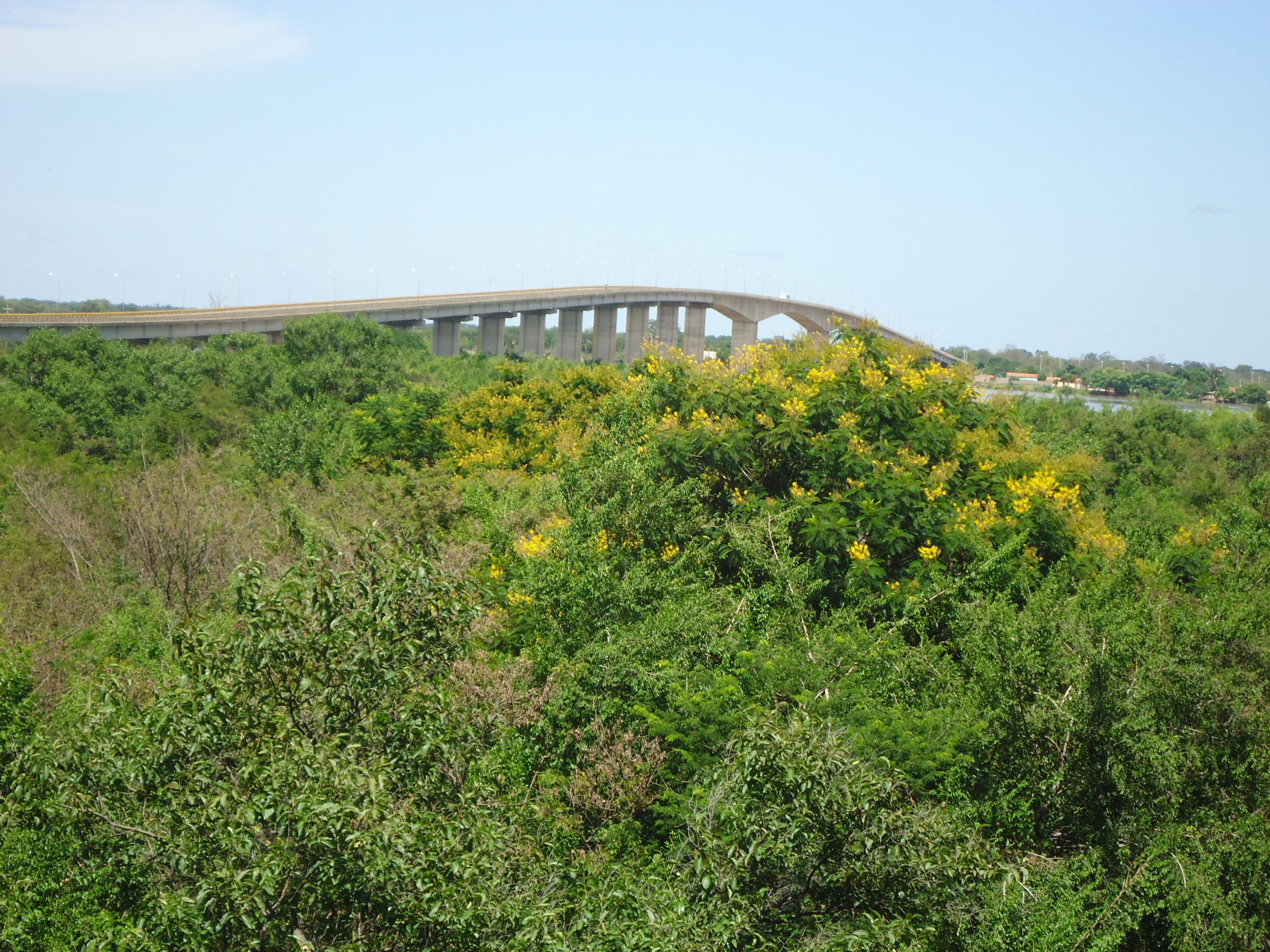 Ponte no município de Bom Jesus da Lapa, Bahia, Brasil.